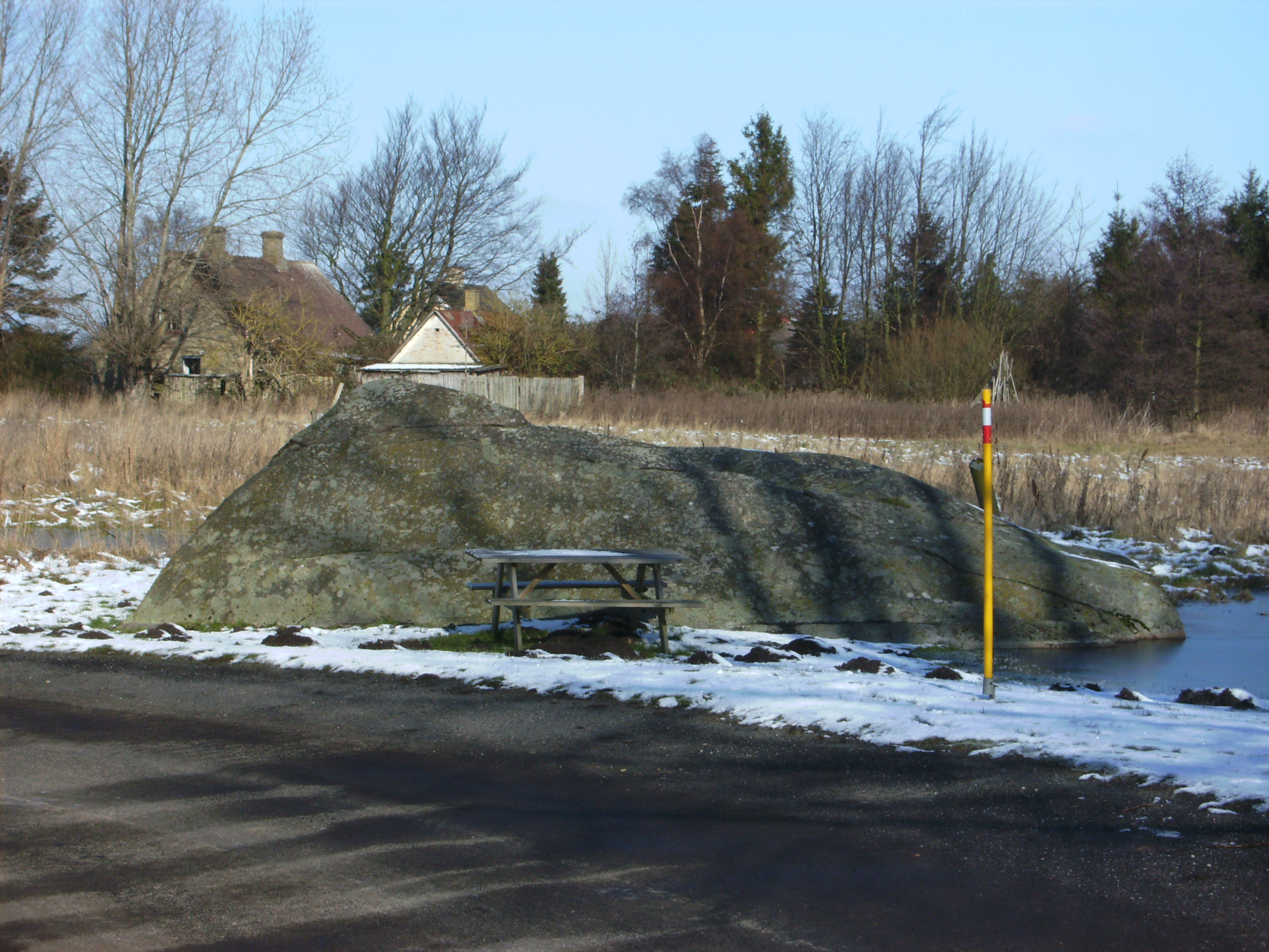 Høvænge er et afvandet område øst for Nysted på Lolland. Lolland største sten, ført hertil med isen for mere end 10000 år siden The biggest sone on Lolland (Denmark) placed here during the Iceage 10000 years ago